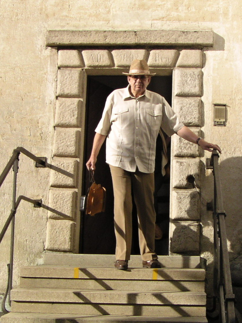 Jan Bistřický v roce 2004 vychází z věže kostela v Dačicích